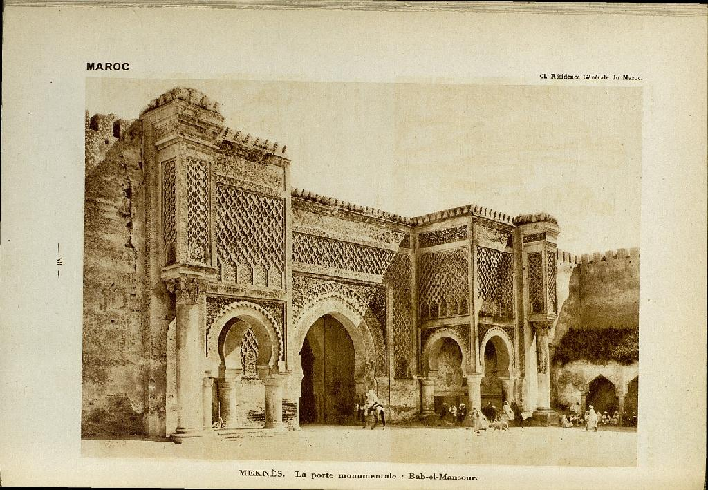 Porte monumentale de Bab-el-Sour à Meknes